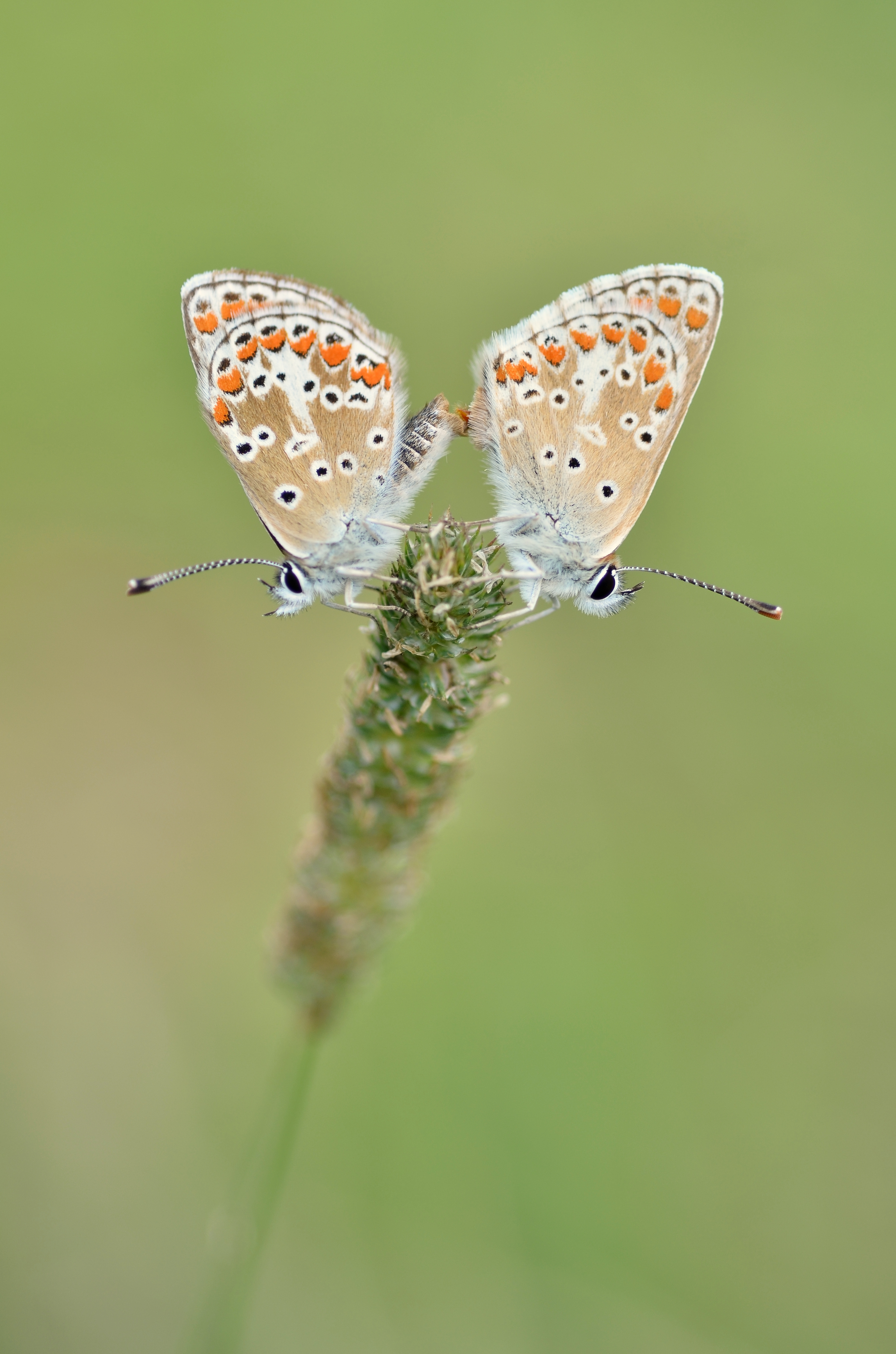 Aricia agestis